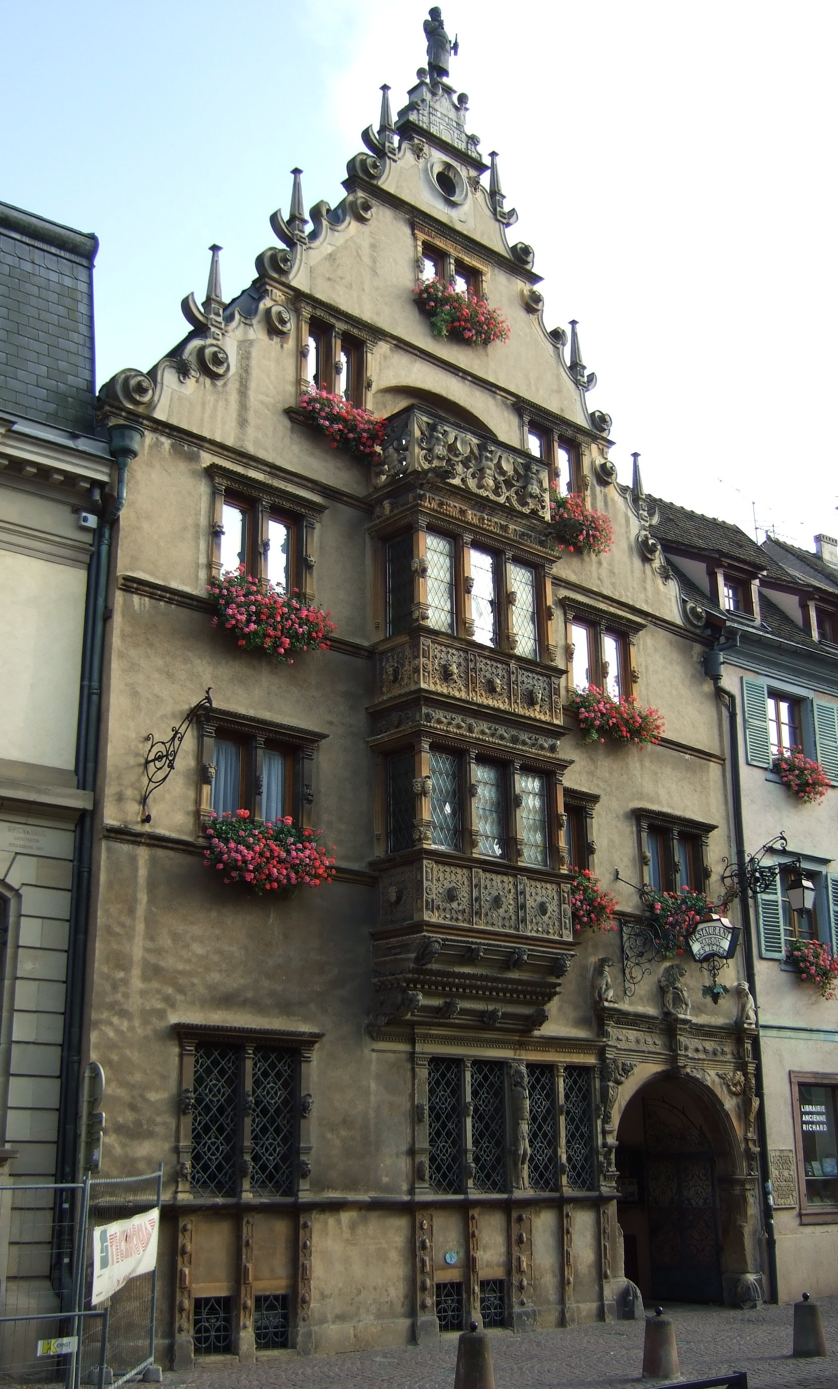 Colmar. Maison des Têtes (1609)